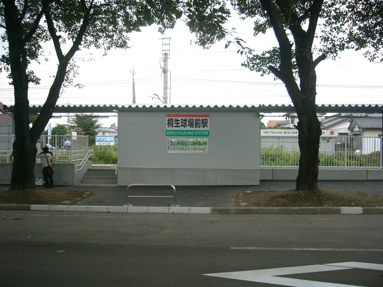 Kiryu kyujo mae Station